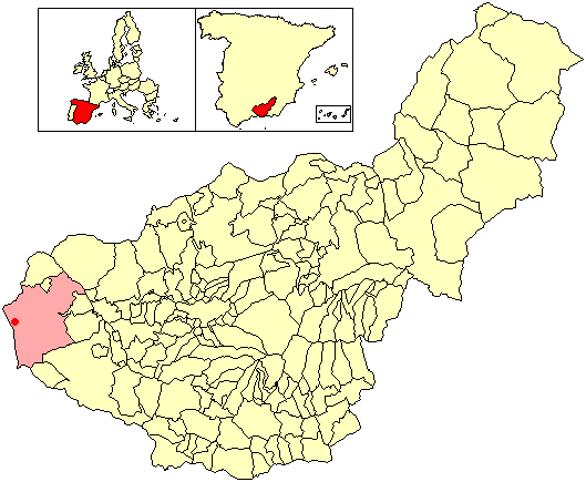 Situación de la localidad de La Palma o Cuesta de la Palma (en el municipio de Loja) respecto a la provincia de Granada, en España.